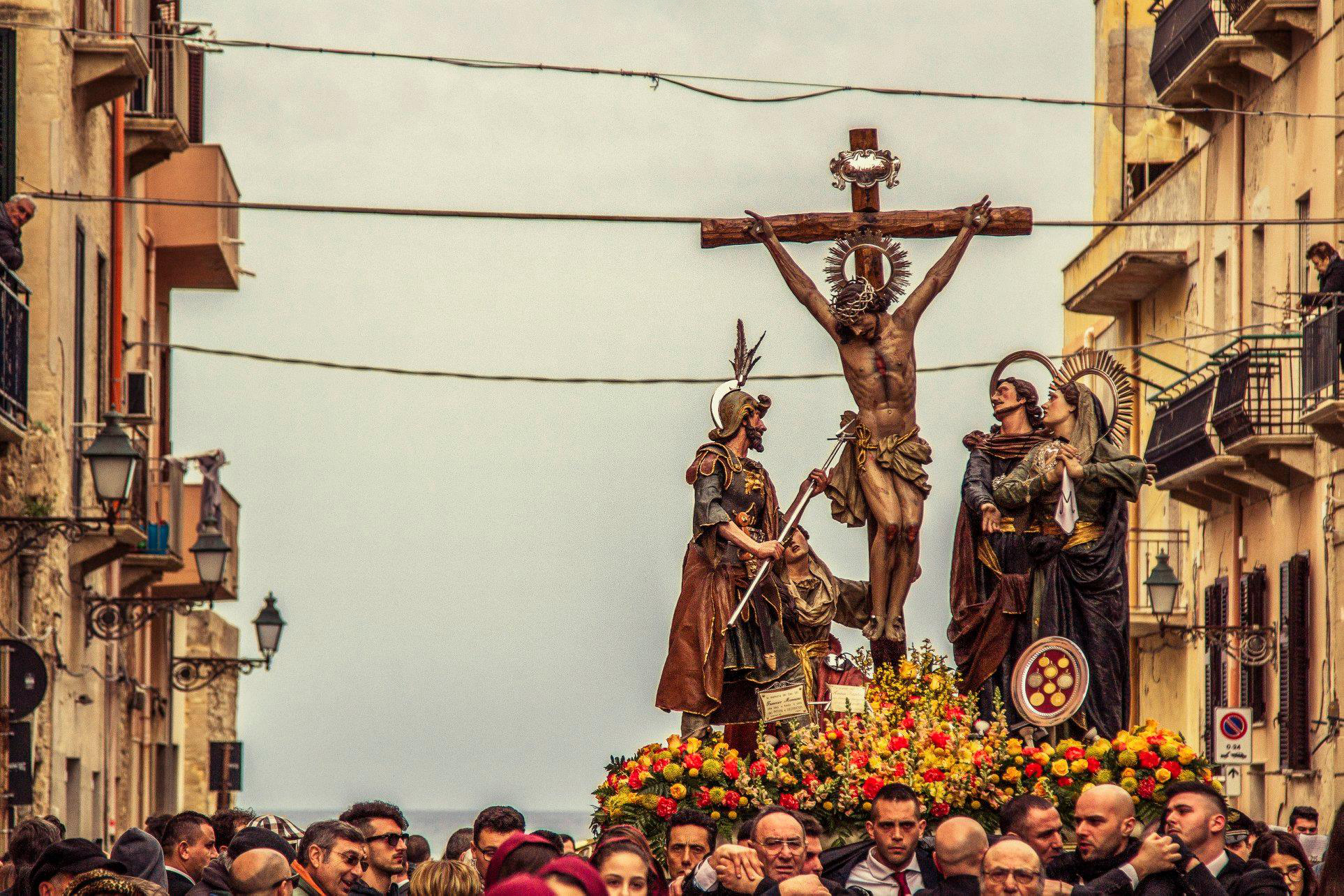 Ferita al costato : Rappresenta Gesù in croce con il capo reclinato nell'abbandono della morte, mentre un soldato lo trafigge al costato con la lancia. Ai piedi della croce, si trovano Maria con le mani congiunte in un atteggiamento di indicibile dolore, Giovanni e Maria Maddalena, inginocchiata ai piedi della Croce. Fu affidato al ceto dei pittori e imbianchini.